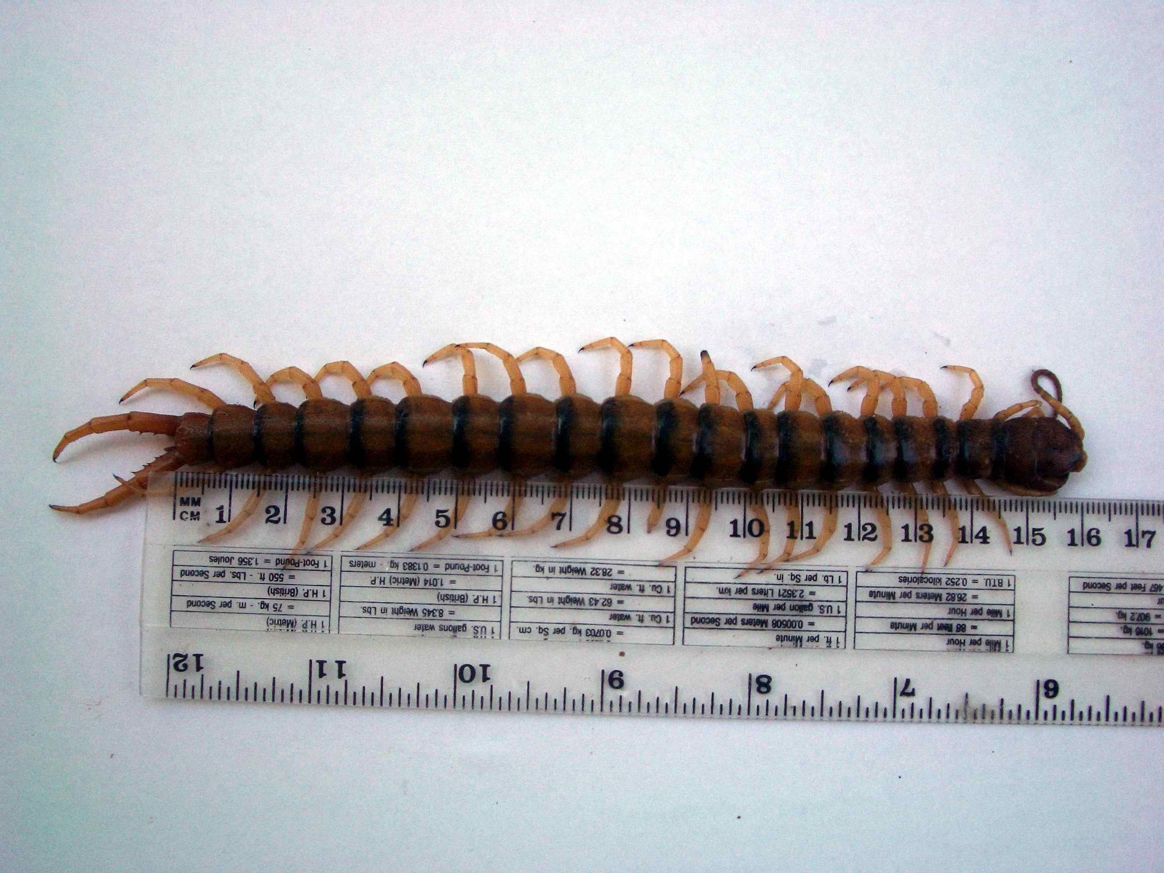 Giant centipede - Ethmostigmus rubripes